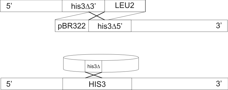 DEL-rendszer